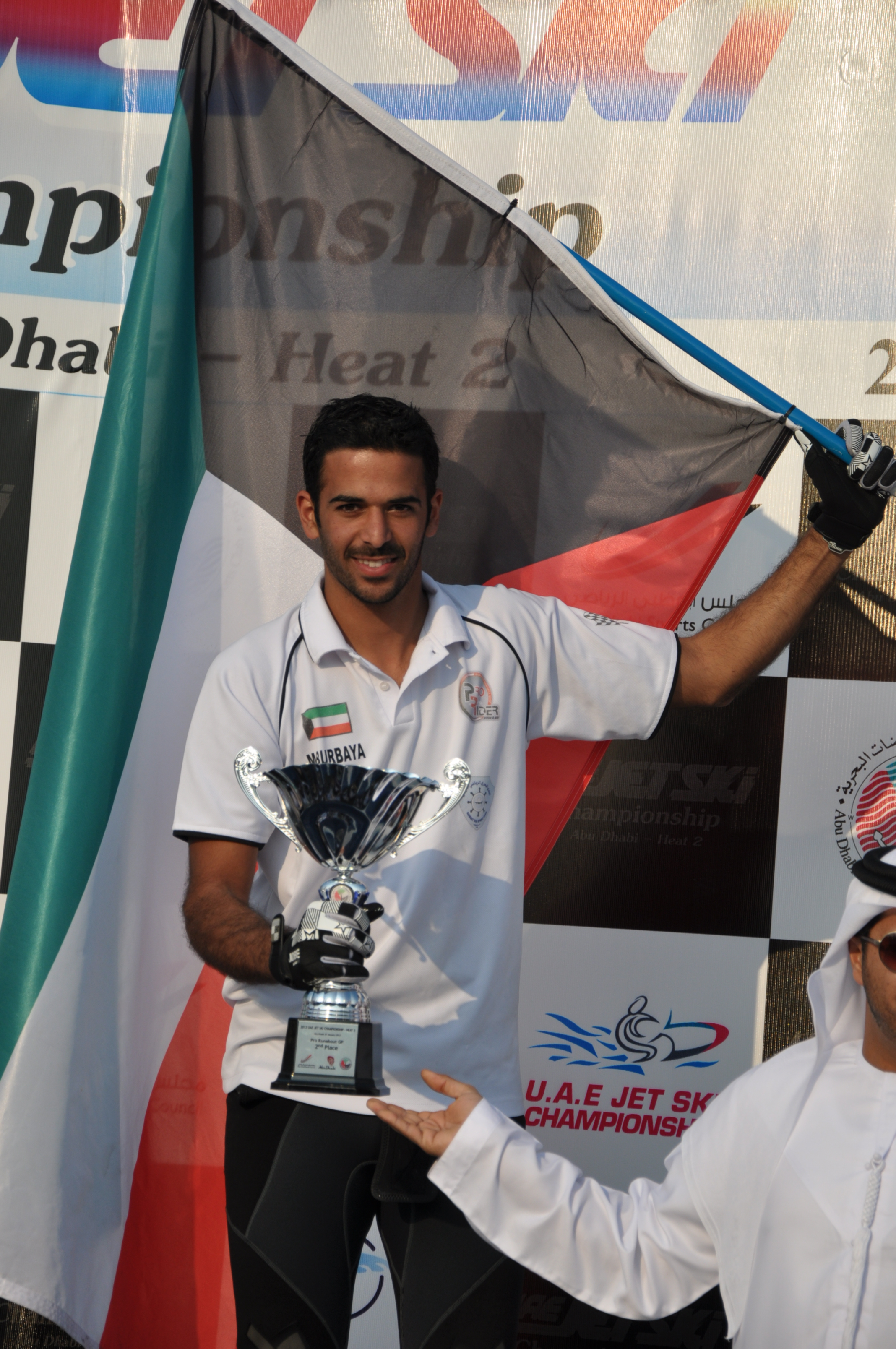 محمد بوربيع